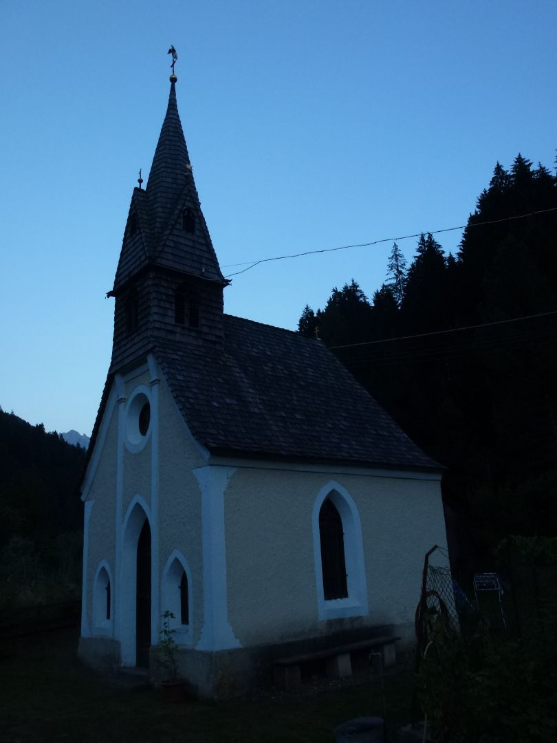 Antoniuskapelle in Birchabruck